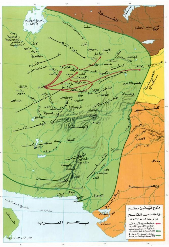 مسار فُتُوحات قُتيبة بن مُسلم ومُحمَّد بن القاسم في بلاد ما وراء النهر وفي السند.